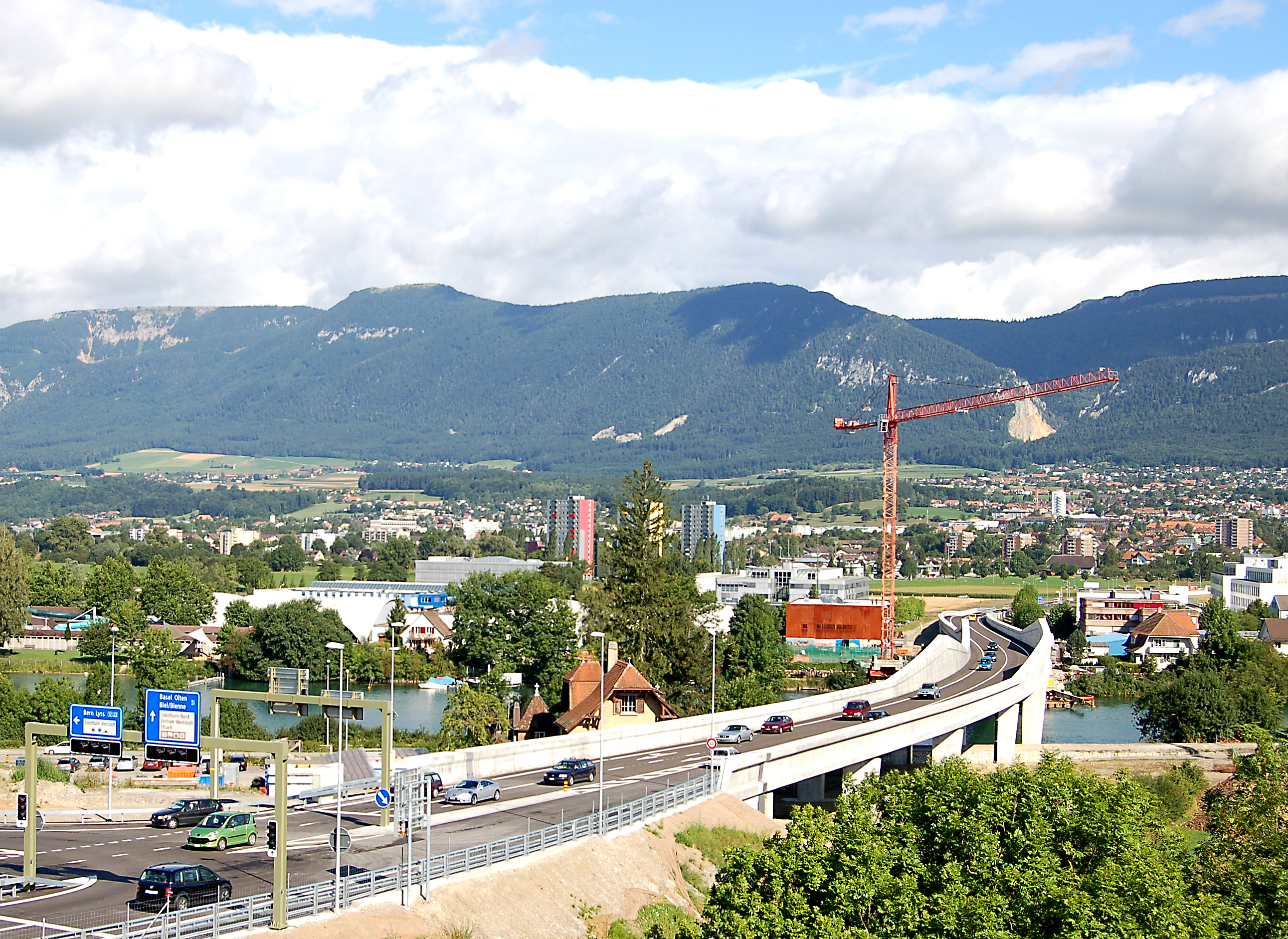 Aarebrücke Westtangente Solothurn, Eröffnungstag 8. 8. 2008